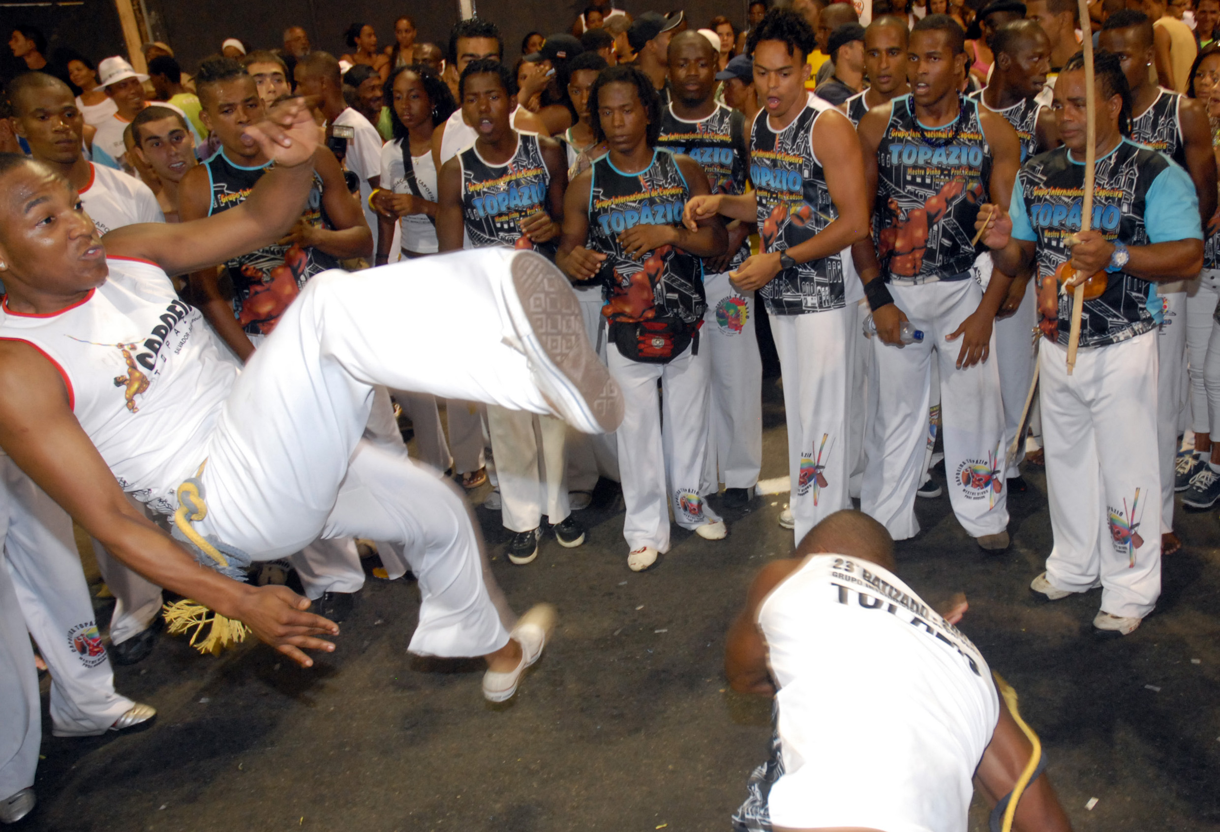 Salvador (BA) - Integrantes do Bloco da Capoeira, comandado por Tonho Matéria, durante apresentação no Circuito do Campo Grande.